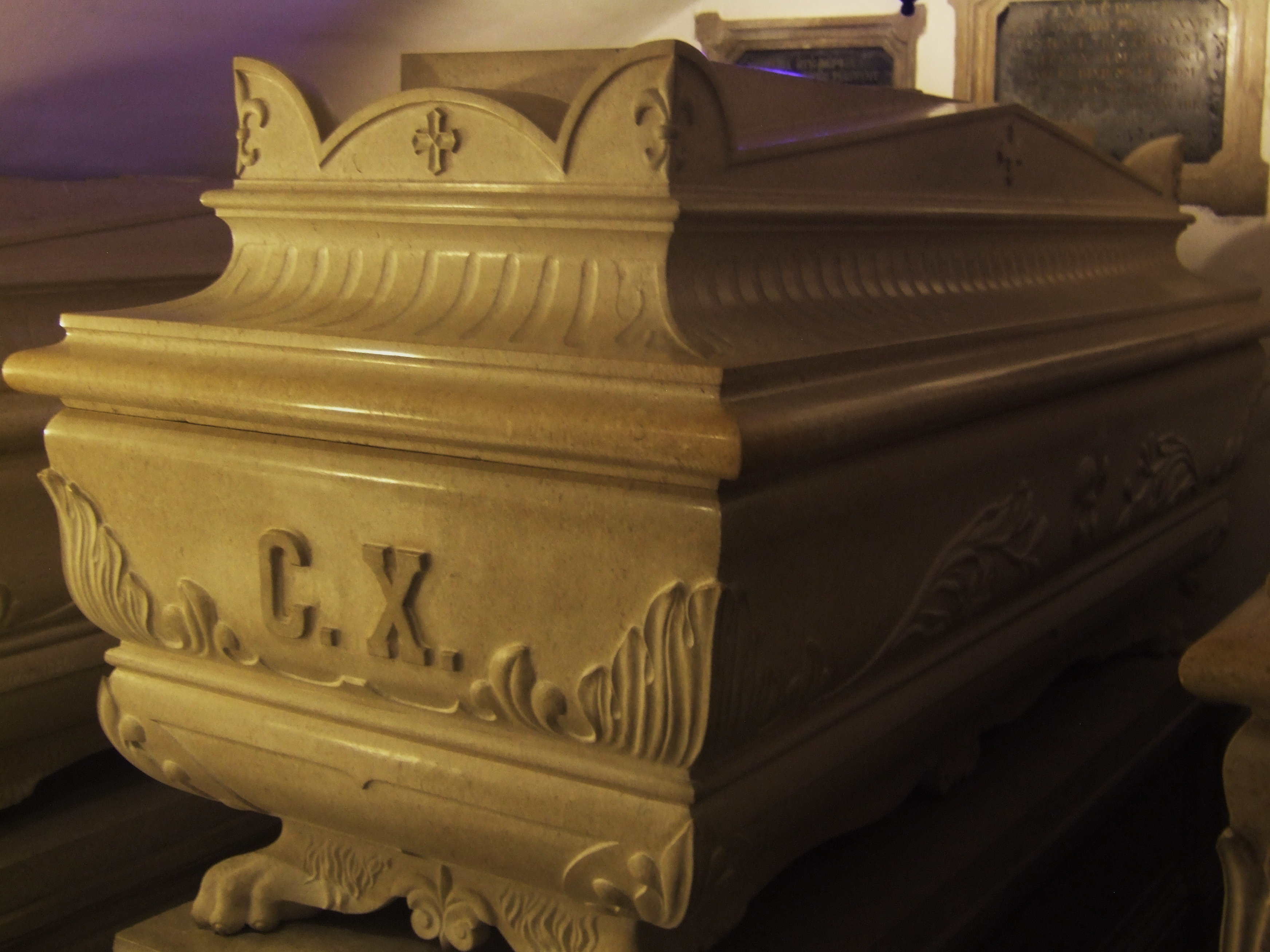 Monastero di Castagnevizza - Cripta dei Borboni La tomba di Carlo X, ultimo re di Francia.